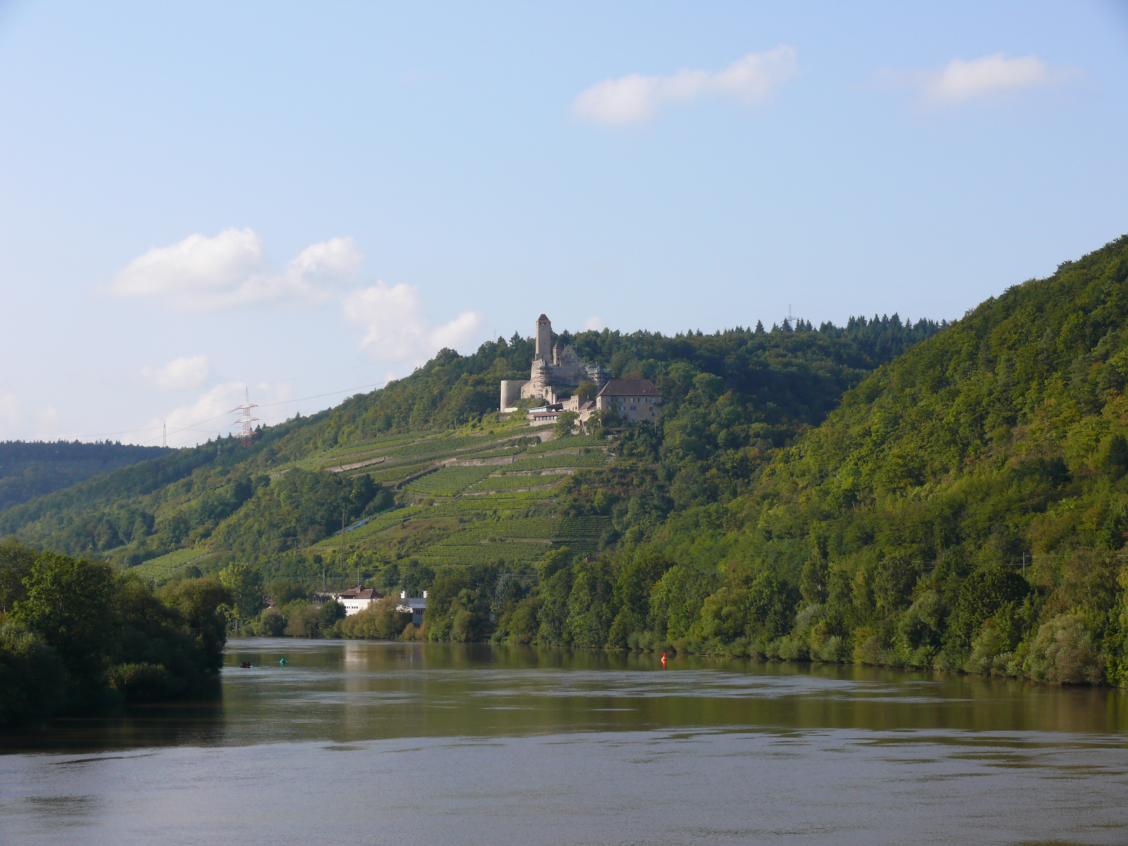 Burg Hornberg über dem Neckartal oberhalb des Ortes Neckarzimmern, fotografiert vom Neckarsteg in Haßmersheim